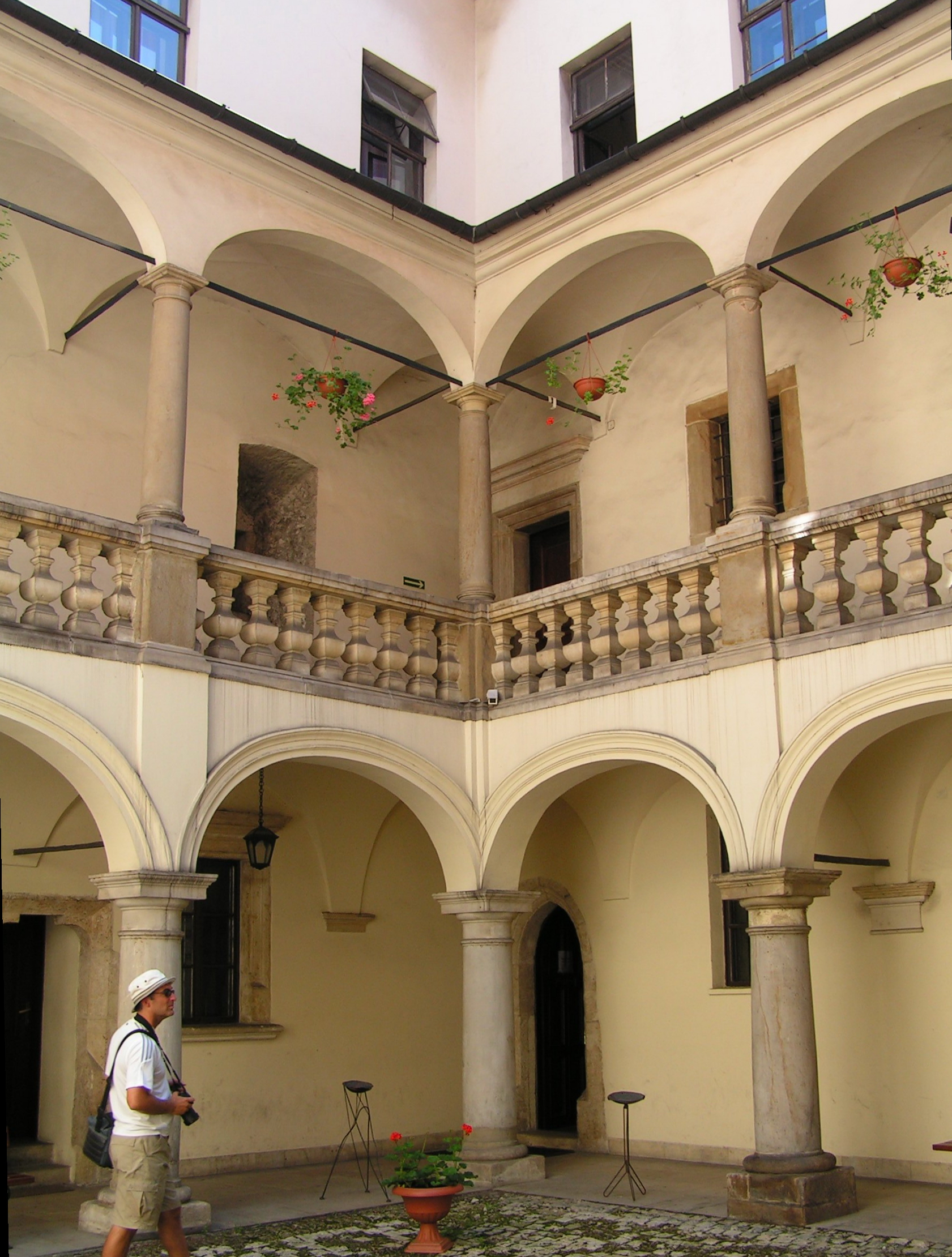 Collegium Iuridicum, Kraków